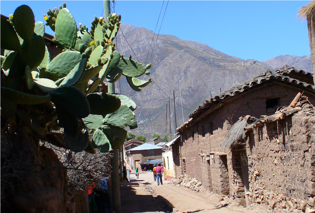 calles de sarhua